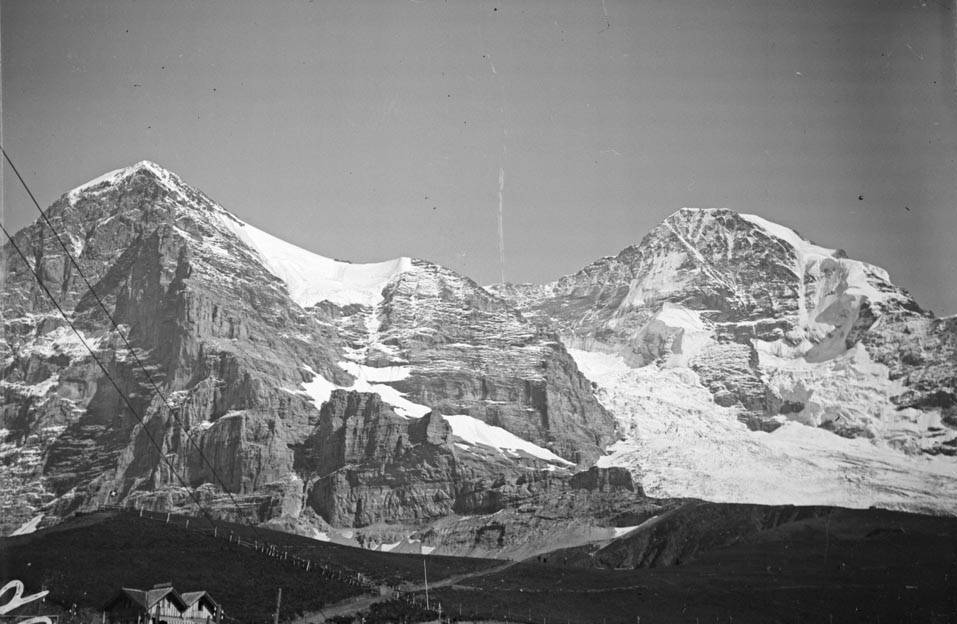 Imatge